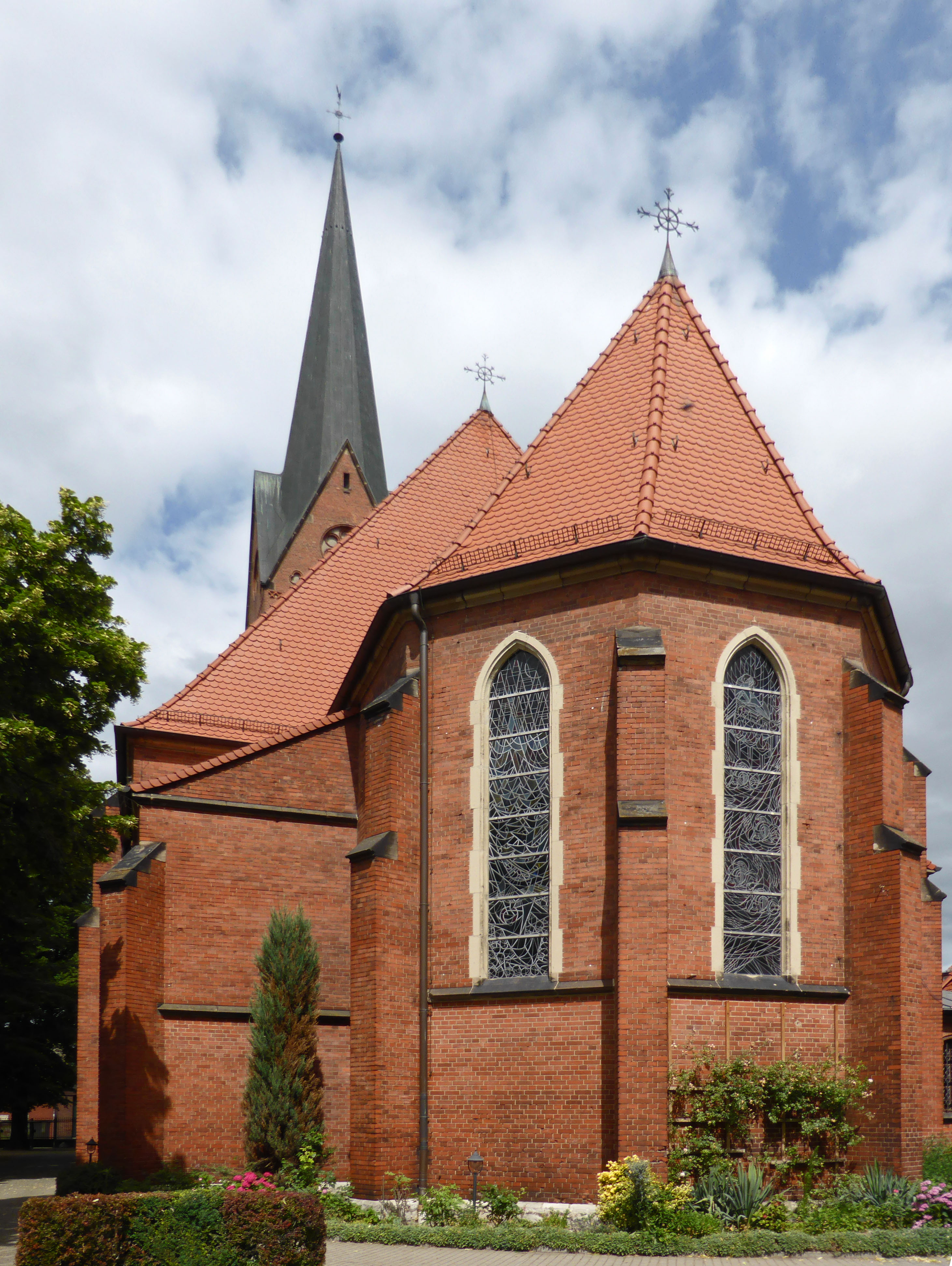 Kath. Kirche St. Johannes der Täufer in Burg bei Magdeburg.